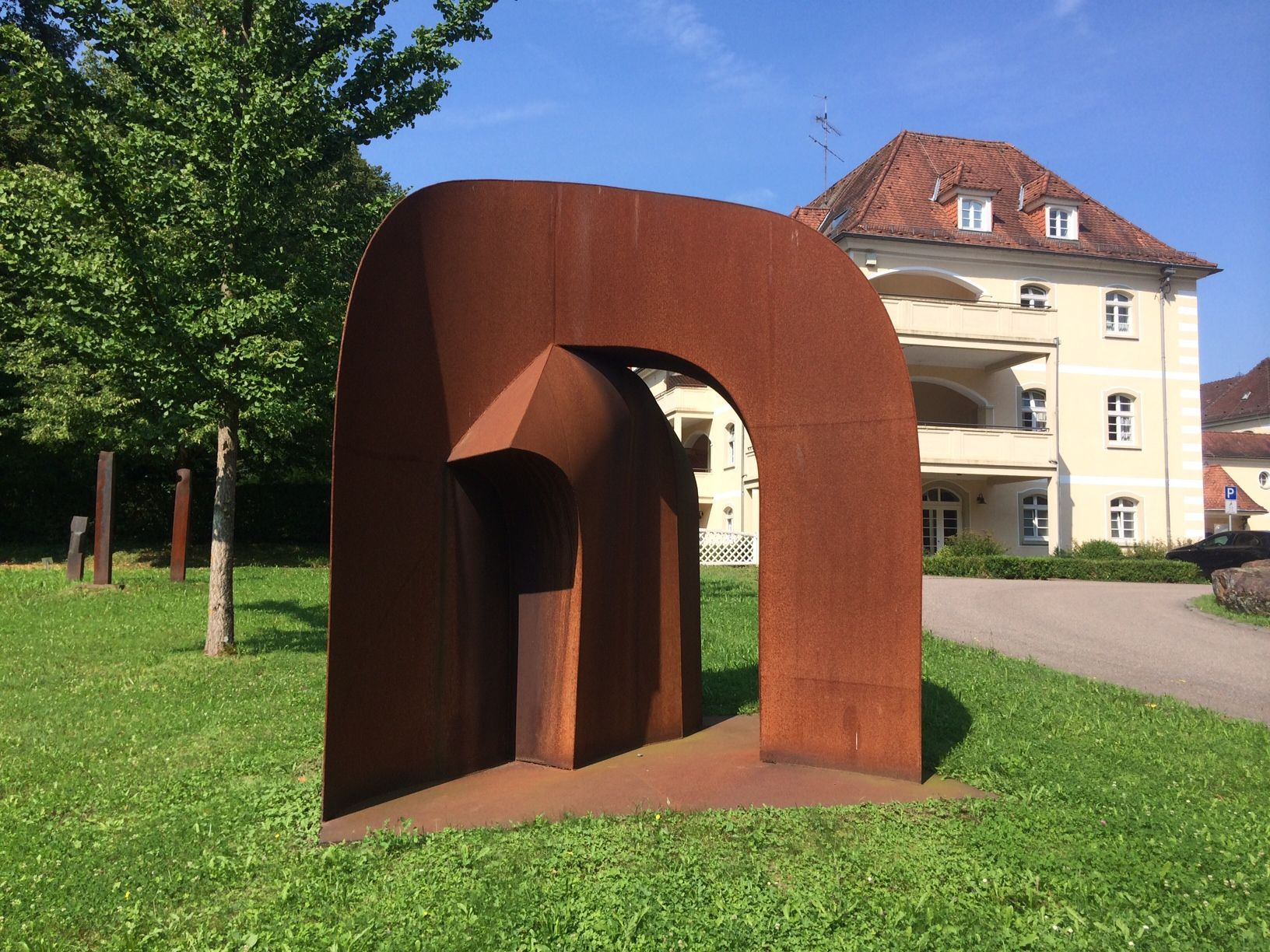 Ammadeo Gabino: Hommage á F. Schiller (1992), Skulpturenpark Heidelberg